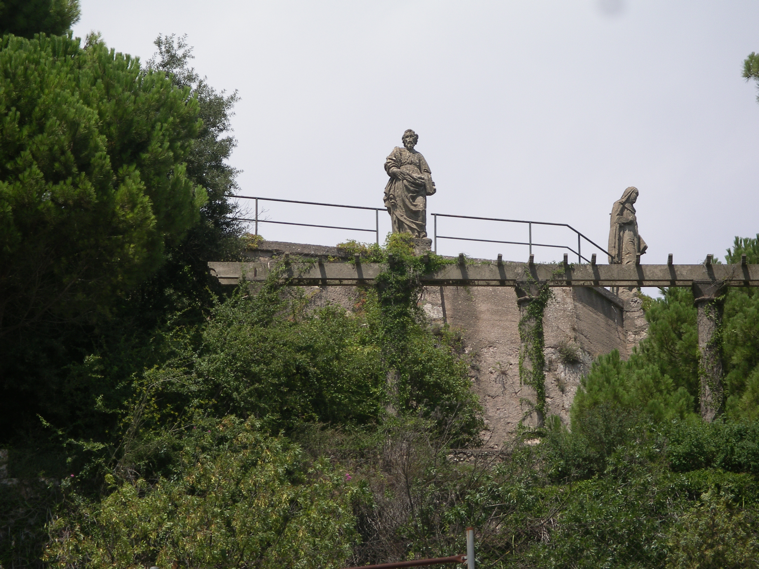 Escultures del safareig de l' Abadia de Montserrat, s. XVII